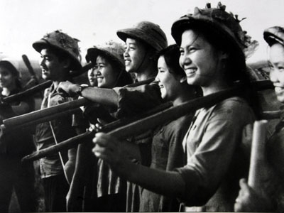 Đoàn nữ thanh niên xung phong Hà Nội ra quân, 1965.